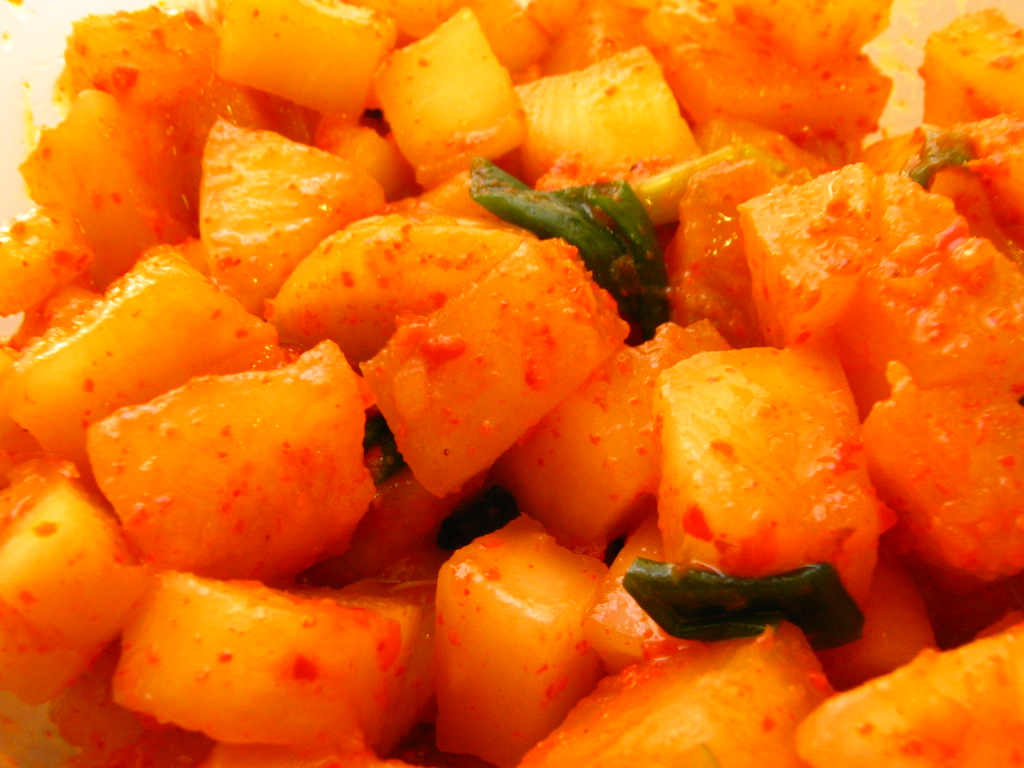 깍두기, 무우로 만든 김치의 일종